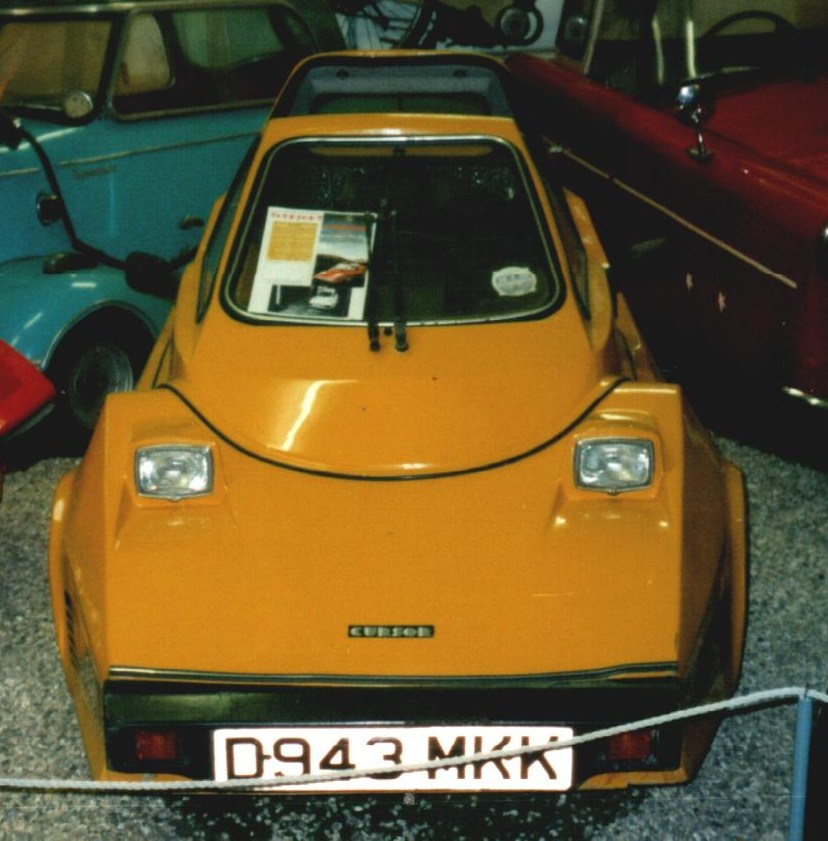 Replicar Cursor von 1986 im Ramsgate Motor Museum.